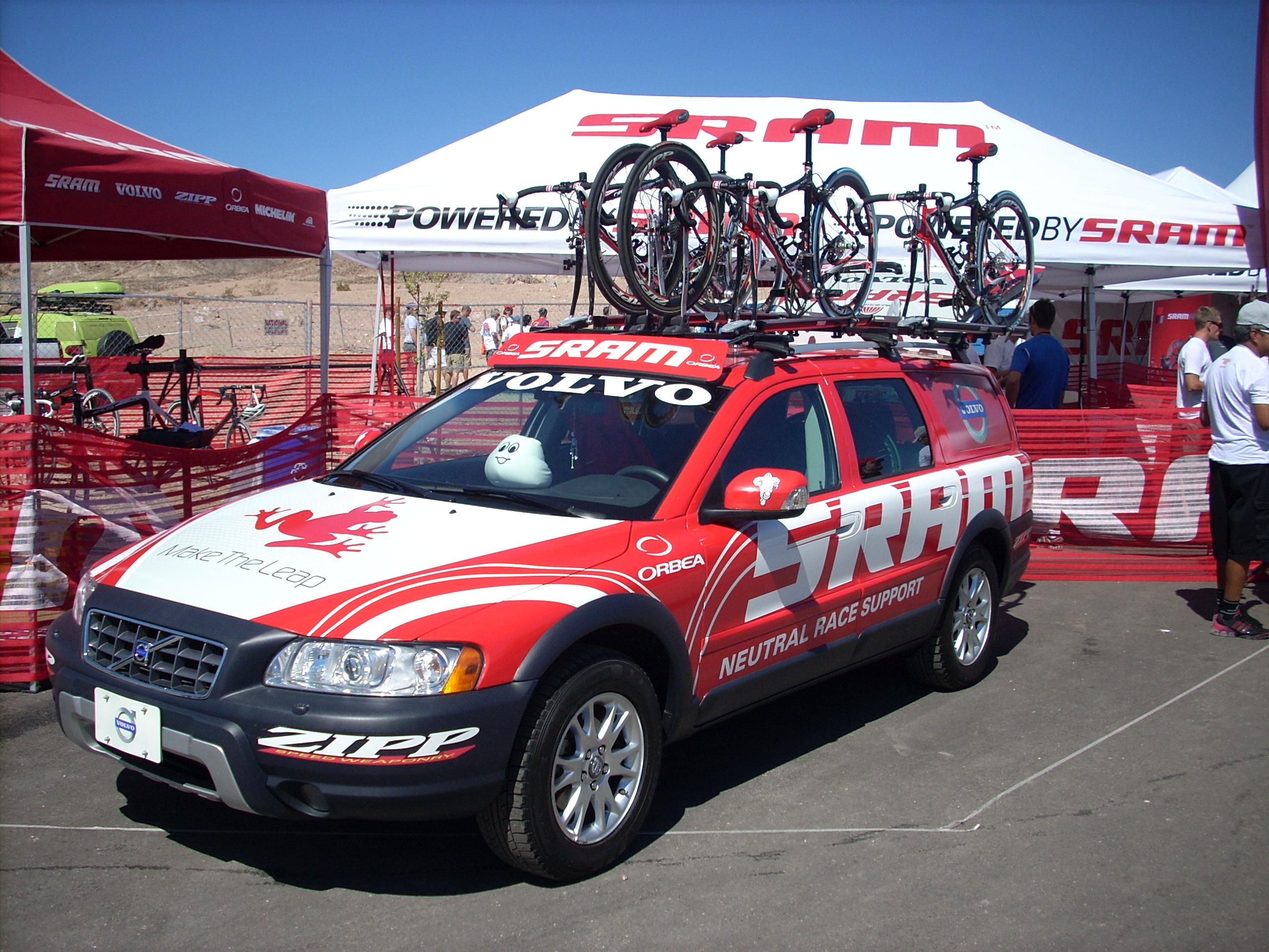 SRAM car